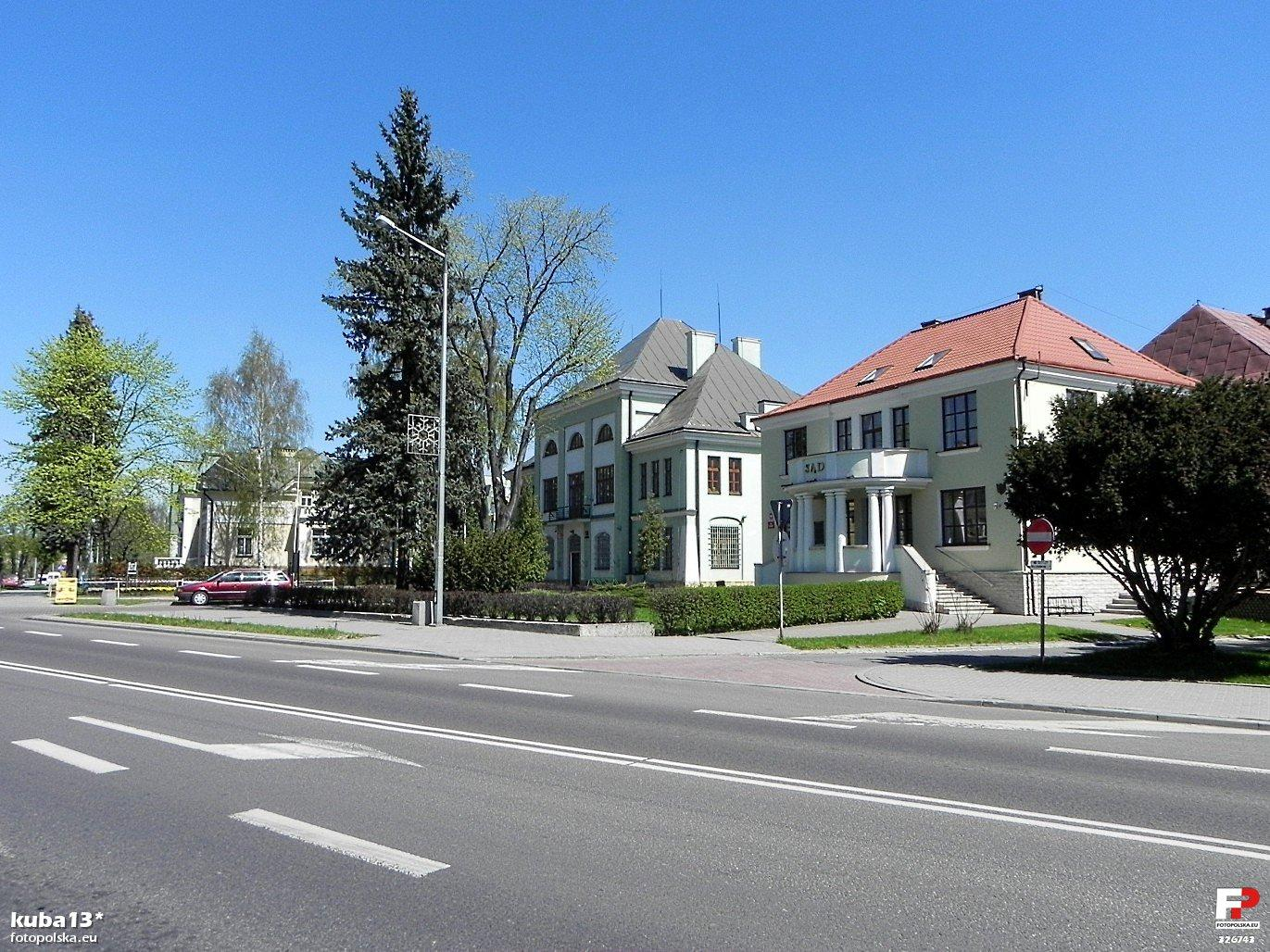 Ulica Lwowska. Od prawej - sąd, urząd stanu cywilnego i sanepid.